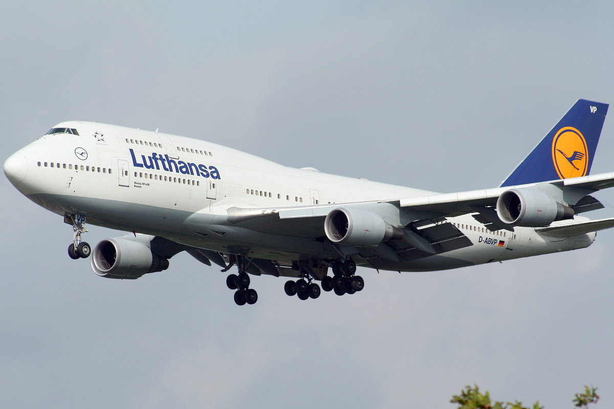 Boeing 747 der LH in Endanflug auf Frankfurt